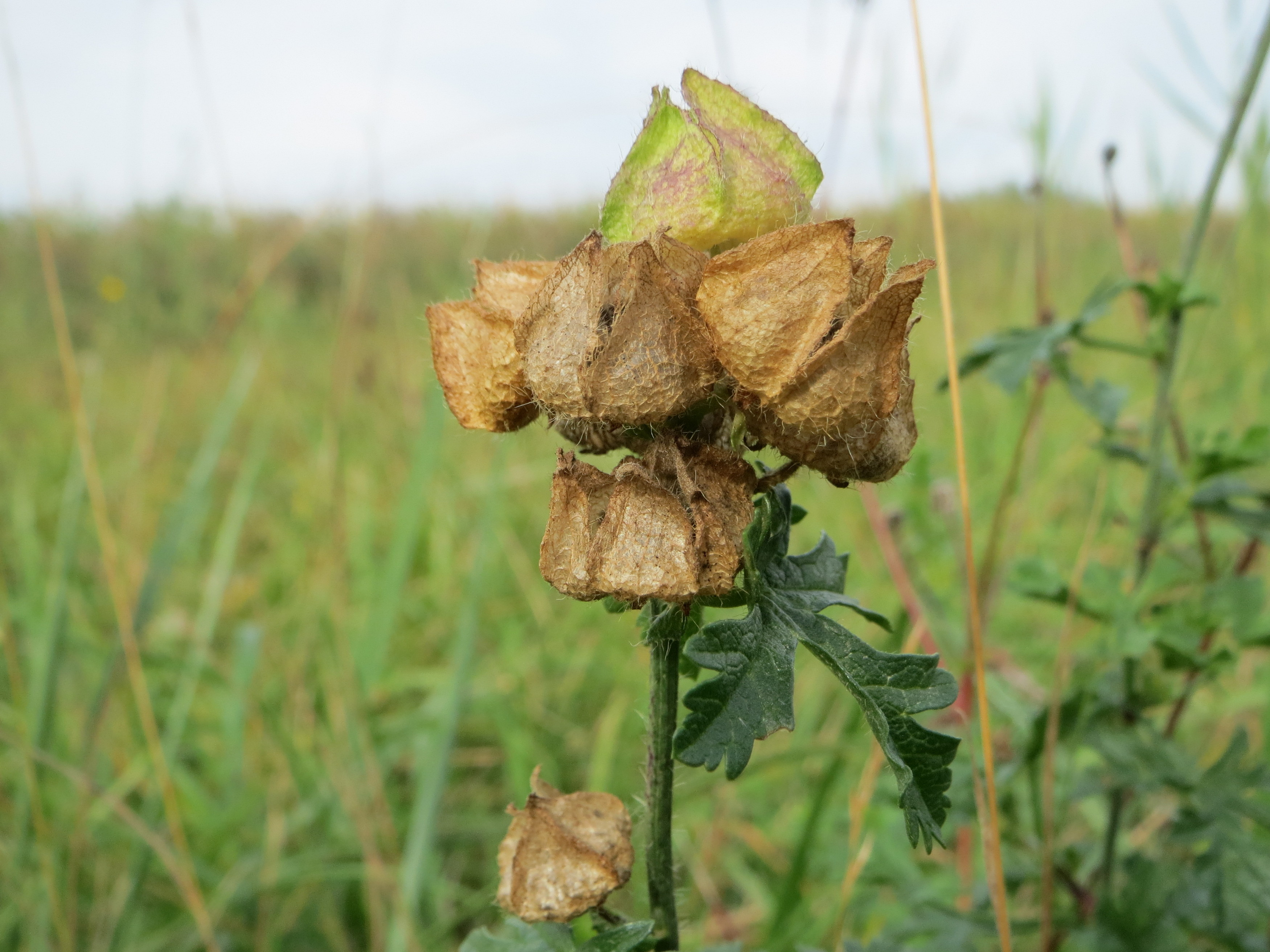 Verblühte Rosen-Malve (Malva alcea) bei St. Leon-Rot